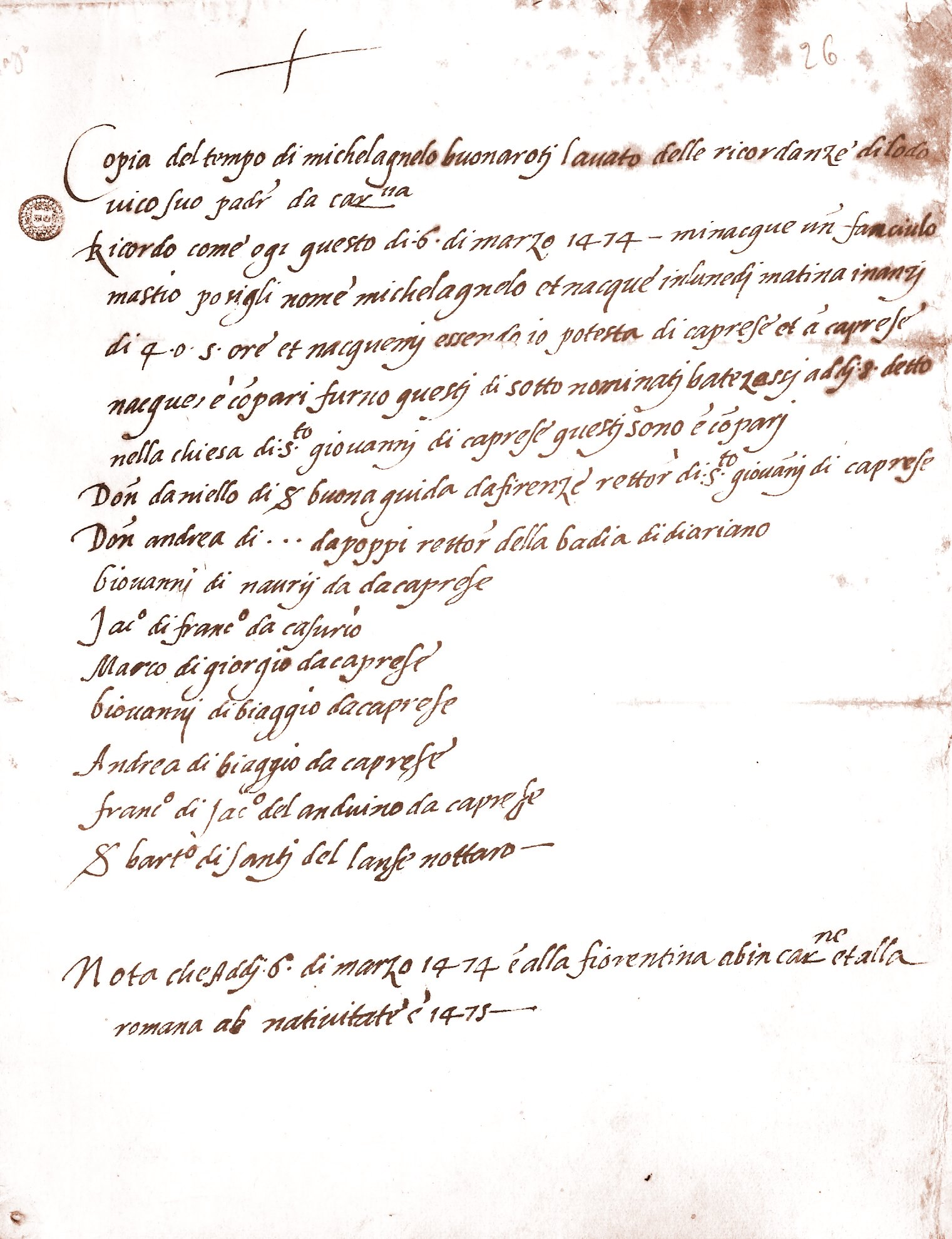 Copia del documento che attesta la nascita ed il battesimo di Michelangelo Buonarroti a Caprese (foto da copia fotostatica). Originale conservato presso l'Archivio della Casa Buonarroti di Firenze.